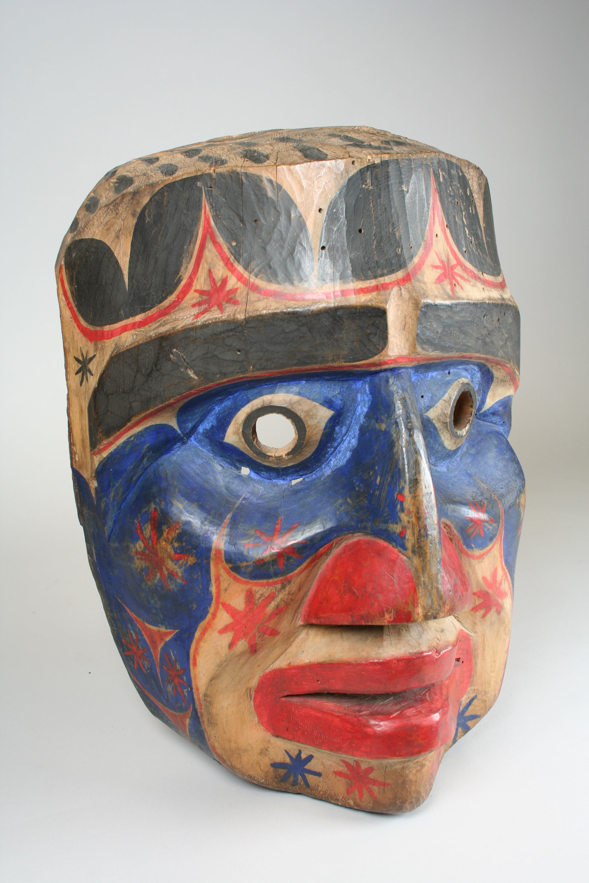 Kwakwaka’wakw (Kwakiutl); Mask; Wood-Sculpture